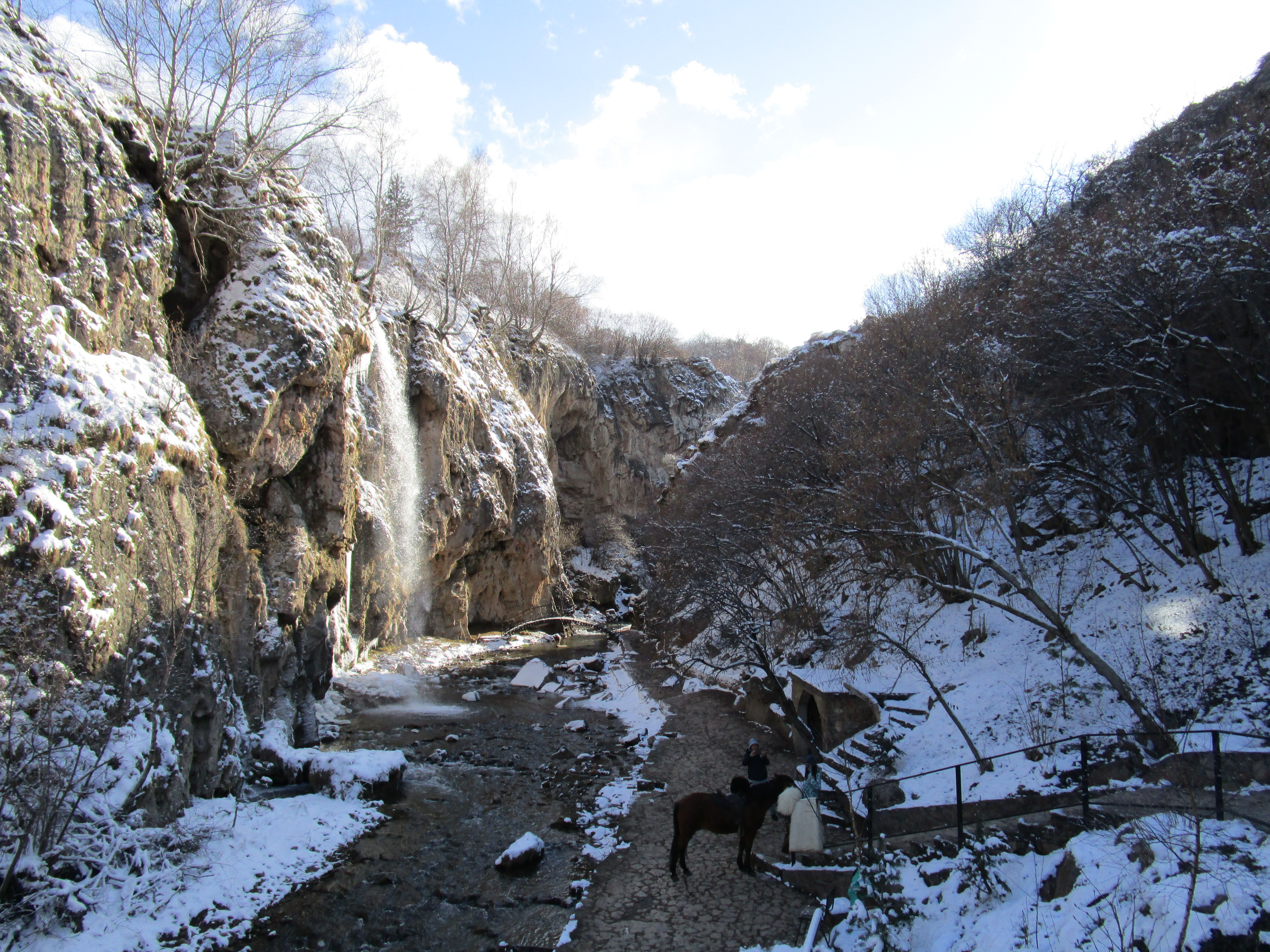 Медовый водопад: Малокарачаевский район, Карачаево-Черкессия This image is related to the protected area of Russia number 0910047